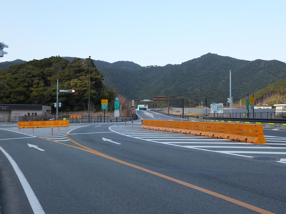 日和佐道路 美波町日和佐地区側入口 （徳島県海部郡美波町）